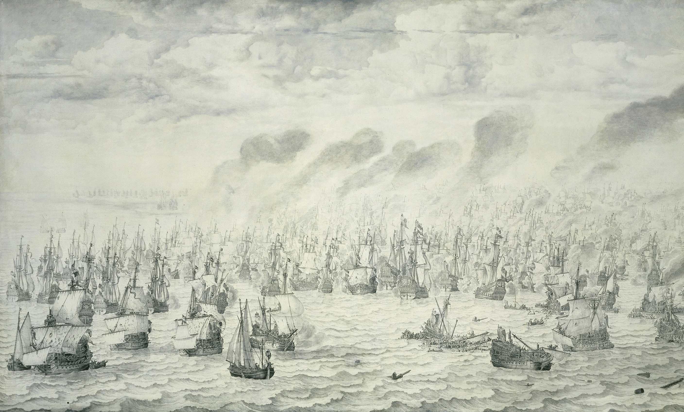 De zeeslag bij Terheide, 10 augustus 1653: episode uit de Eerste Engelse Zeeoorlog (1652-54). Slag tussen Nederlandse en Engelse oorlogsschepen. Afgebeeld zijn (onder andere) de schepen Hollandia, Vrede, Resolution, Zeelandia en Brederode.; Willem van de Velde I (1611–1693), inkt op doek, 1657